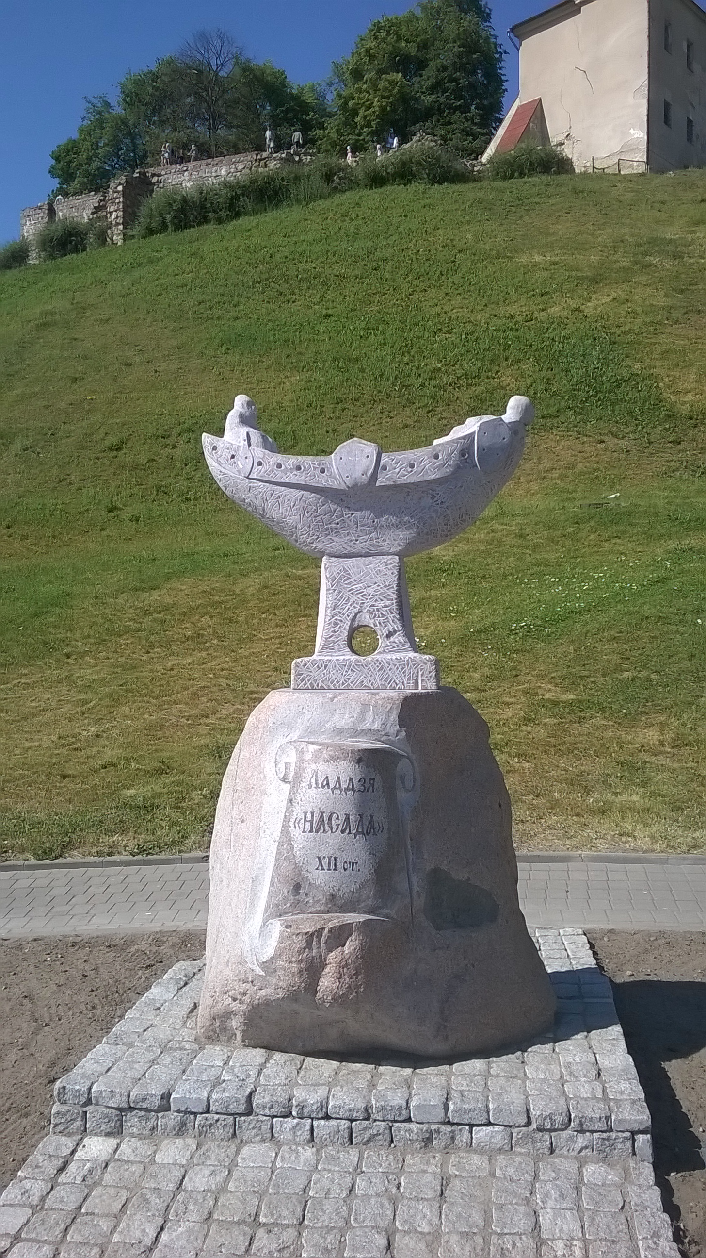 Шахматная фігурка-ладдзя на фоне Старога замка, адкрытая падчас XI Рэспубліканскага фестывалю нацыянальных культур у Гродна.